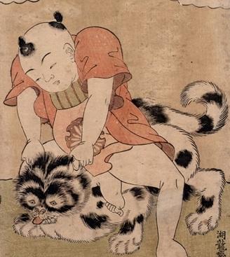 正方形の布を斜めに使った子供用の腹掛け。湖龍斎『犬にまたがる童子』より。